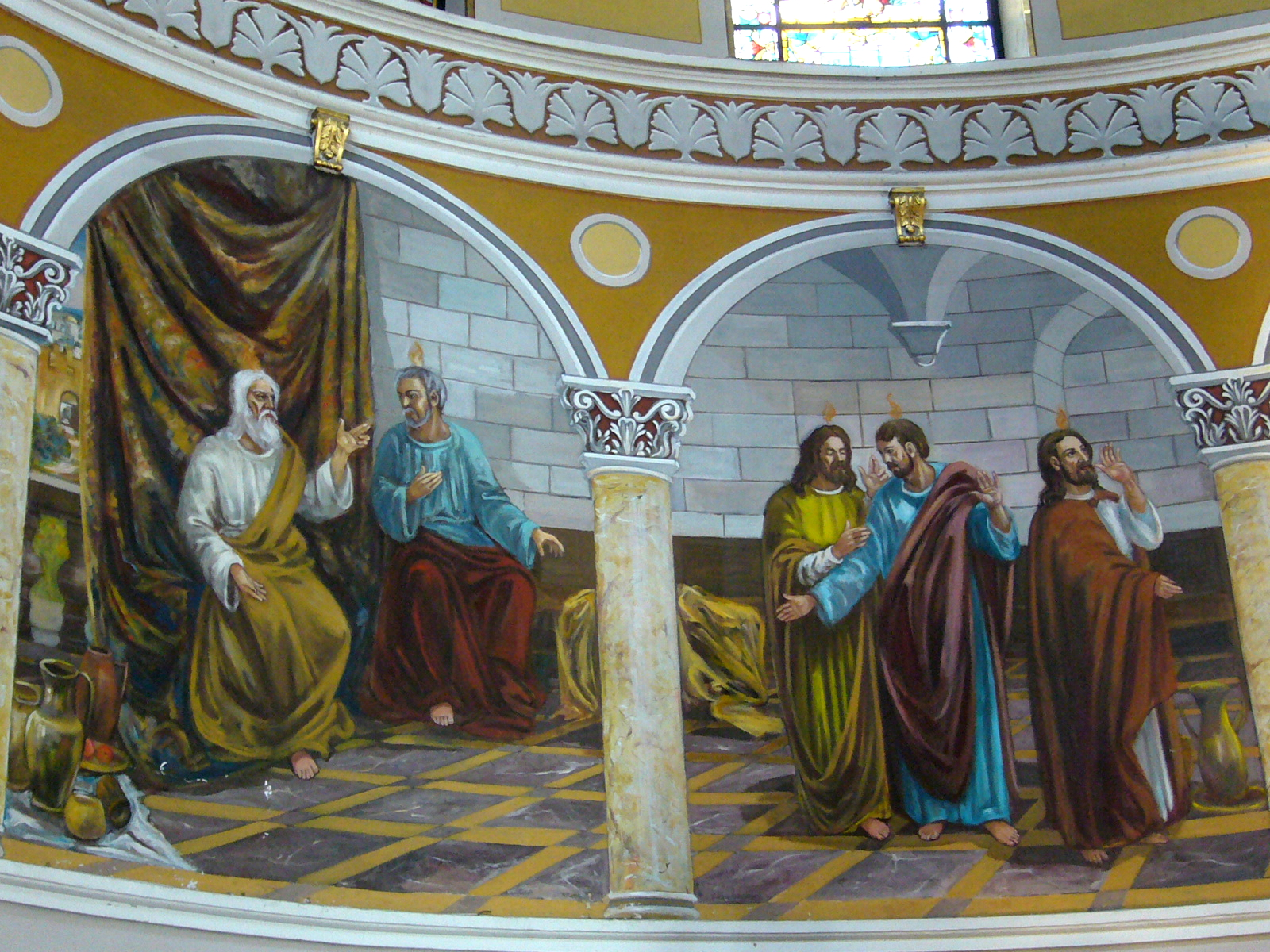 Zdjęcie przedstawia fragment polichromii wg projektu i wykonawstwa łódzkiego artysty malarza Mieczysława Saara. Kościół Zesłania Ducha Świętego w Łodzi przy ul. Piotrkowskiej 2/2a (w sąsiedztwie Placu Wolności).